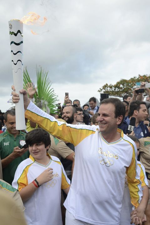 Tocha Olímpica chega à cidade do Rio de Janeiro